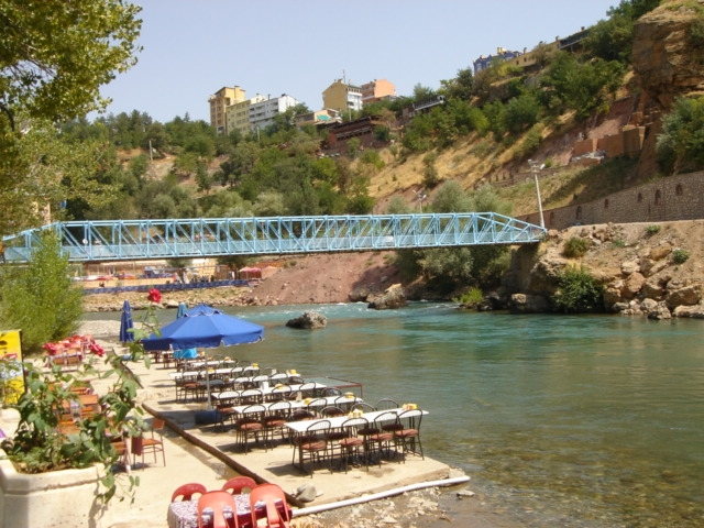 Tunceli ville